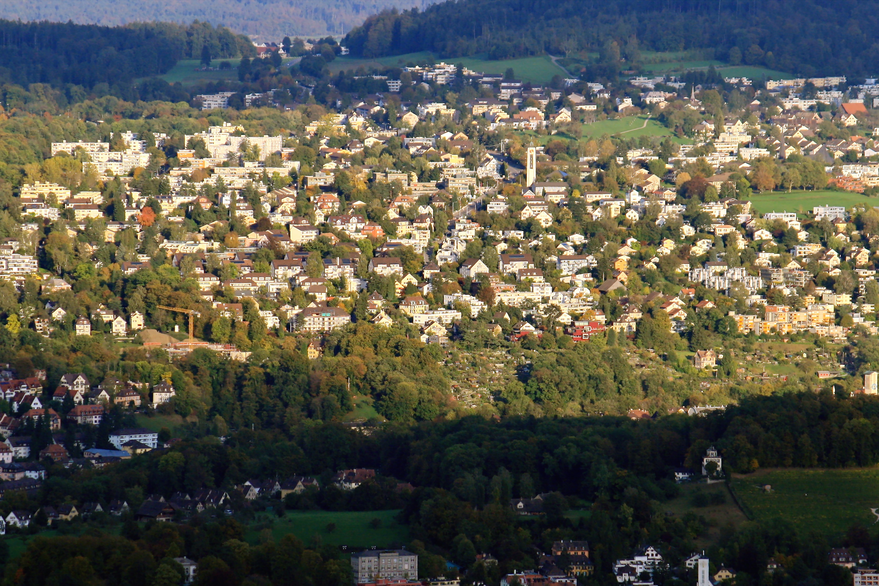 Zürich-Witikon, as seen from Uetliberg Aussichtsturm, Hirslanden and Weinegg quarters in the foreground.